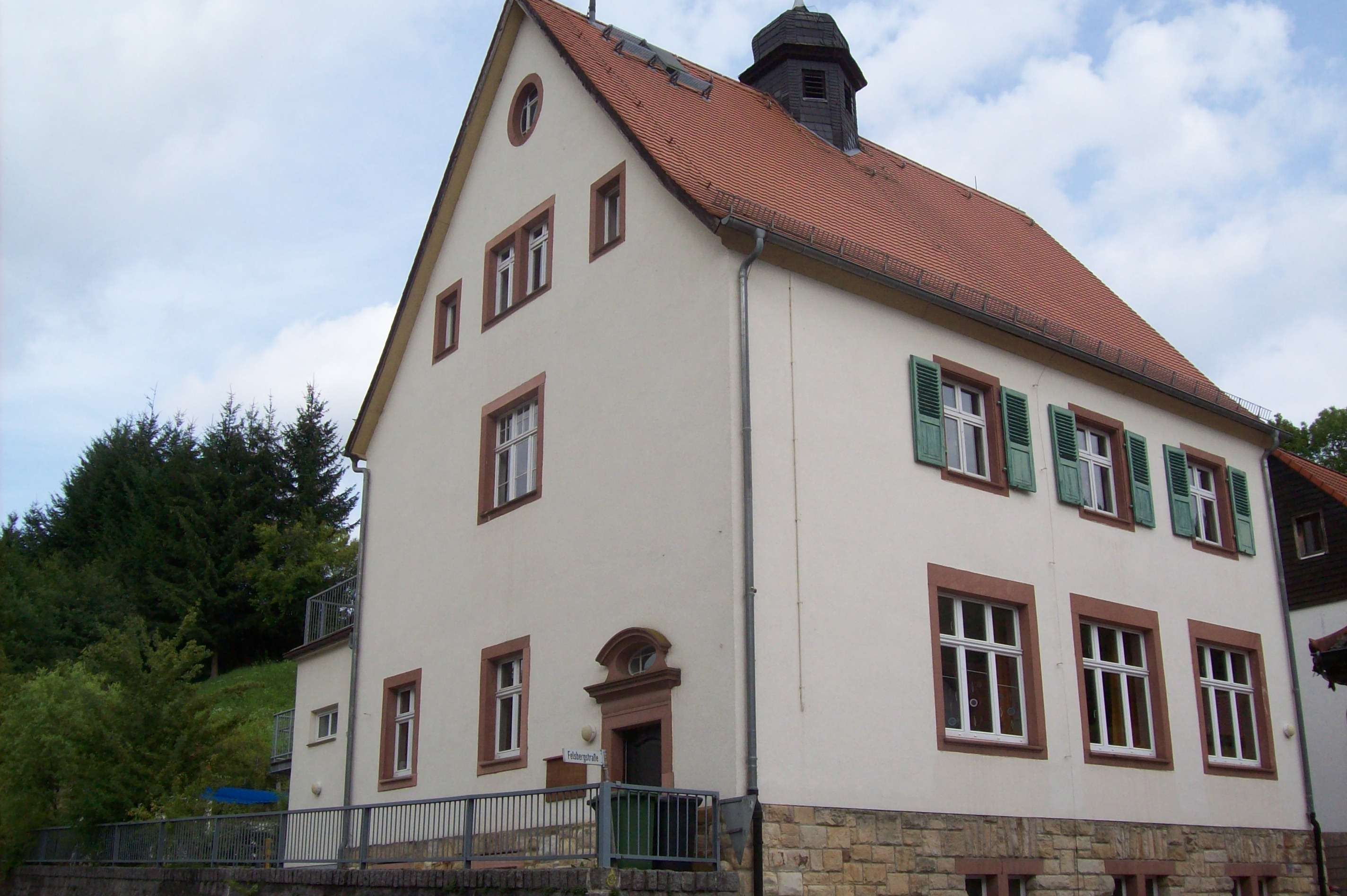 Das alte Schulhaus von Bensheim-Hochstädten, Hessen, Deutschland